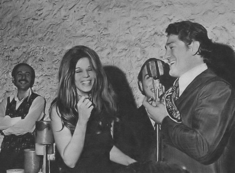 Susana Giménez y Ringo Bonavera en el quinto cumpleaños de Mau Mau. foto aparecida en la revista Siete Días Ilustrados, 18 de abril de 1970